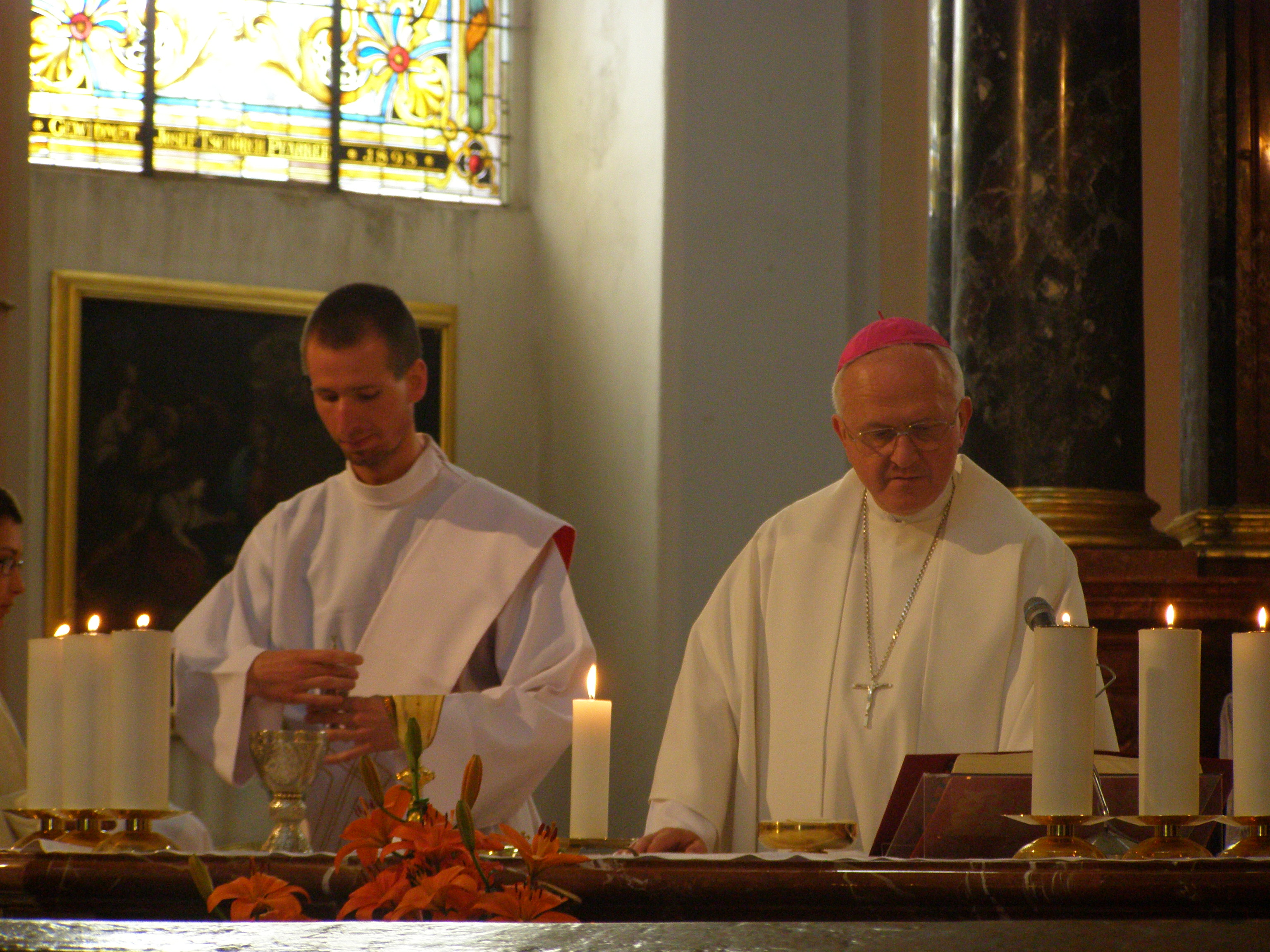 Jan Baxant celebrující mši v bazilice sv. Vavřince v Jablonném v Podještědí